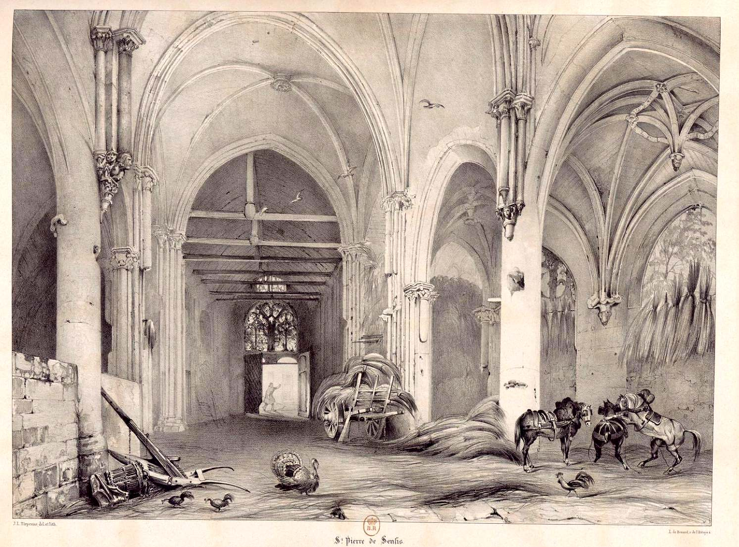 Senlis (Oise), ancienne église Saint-Pierre, vue intérieure vers l'ouest, par Jean-Louis Tirpenne, vers 1840-1854.